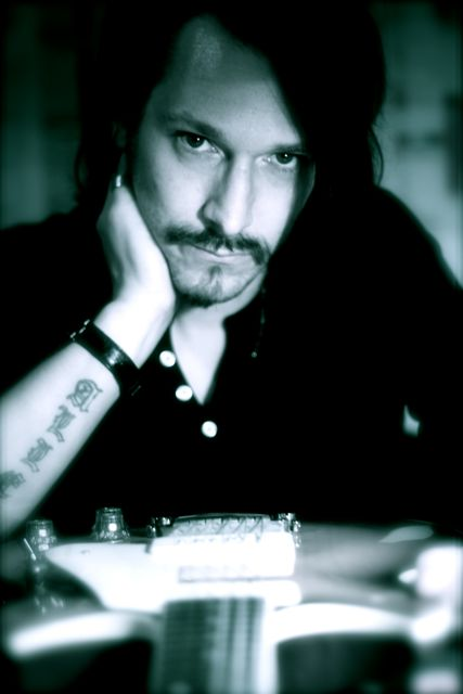 Dennis Hormes and Yamaha SG